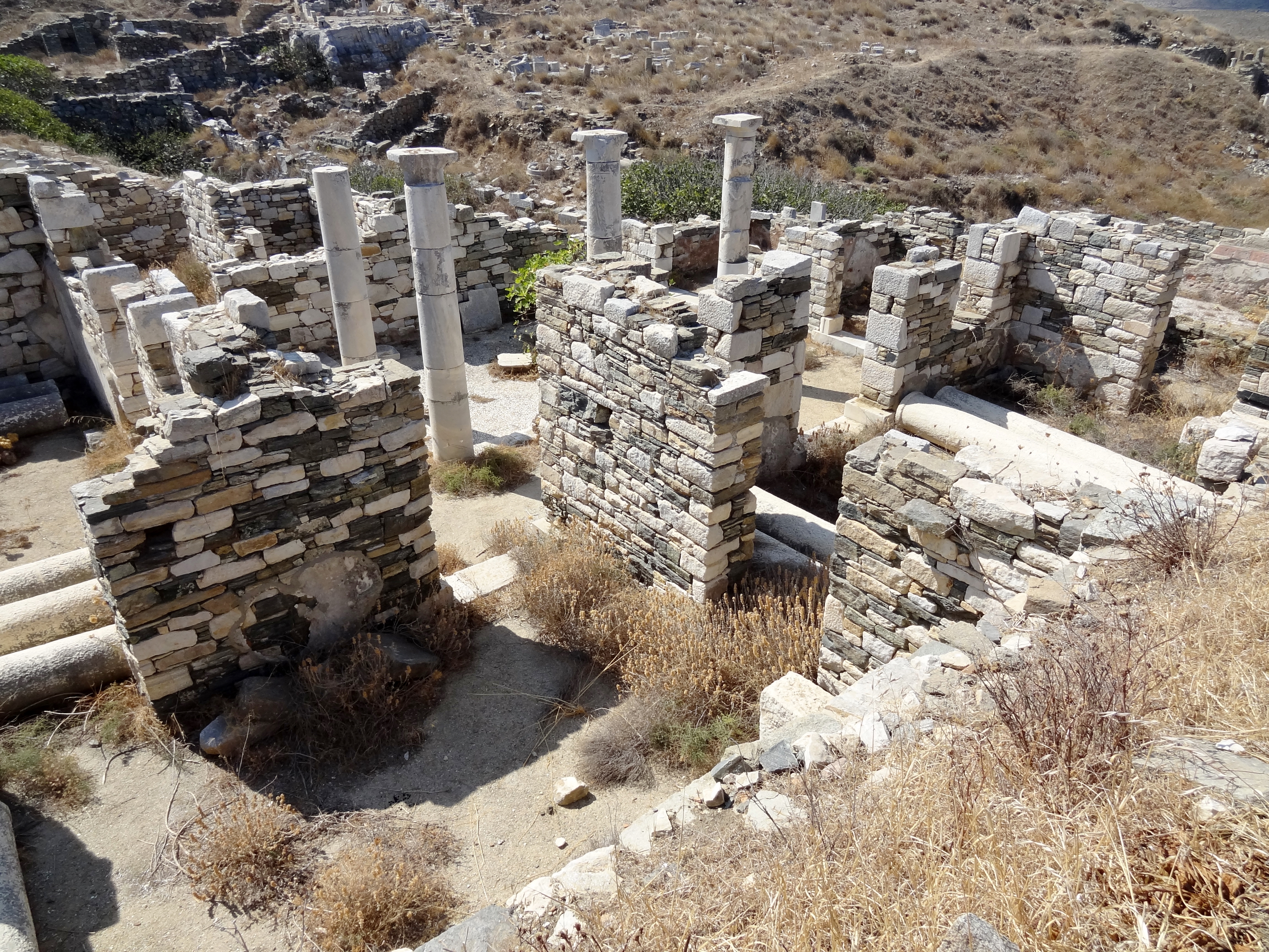 Haus des Inopos in der Ausgrabungsstätte von Delos, Kykladen, Griechenland